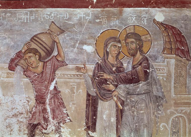 Eglise du Saint-Sauveur, transept sud : les noces de Cana, fragment.